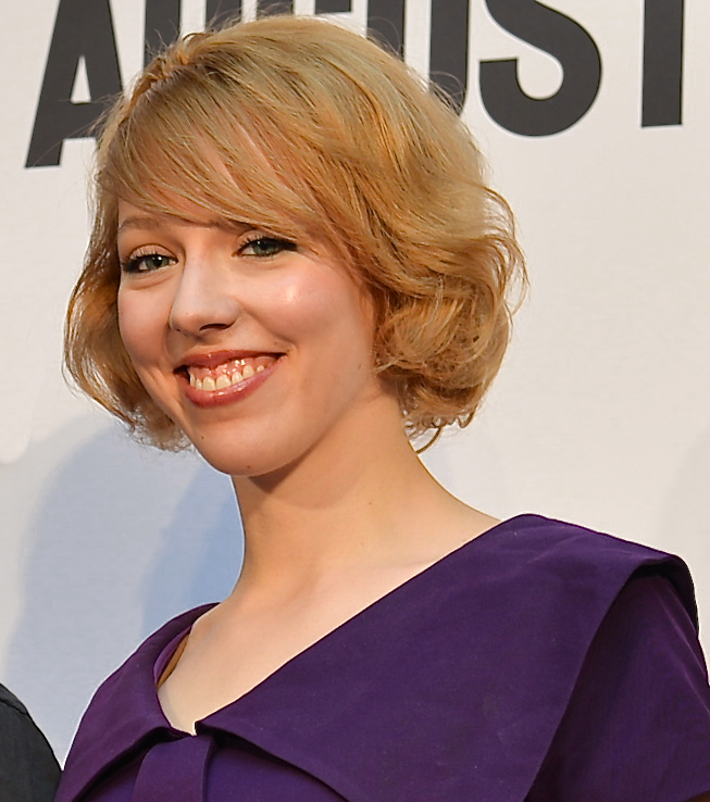 Katrine Kielos, Augustprisnominerad 2012.